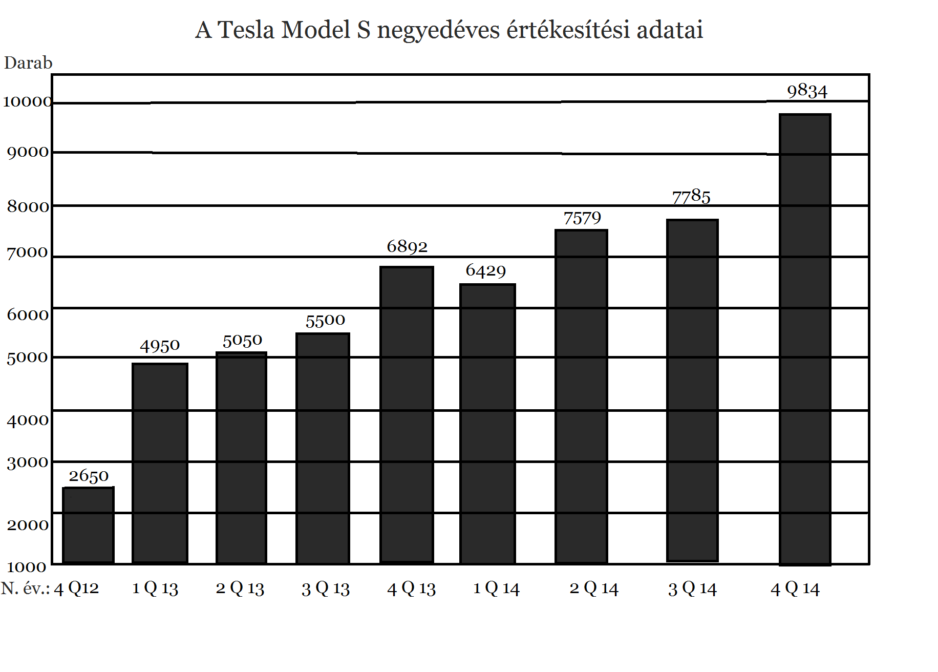 A Tesla Model S negyedéves értékesítési adatai. Adatok forrása: Dátum: 2015-02-12